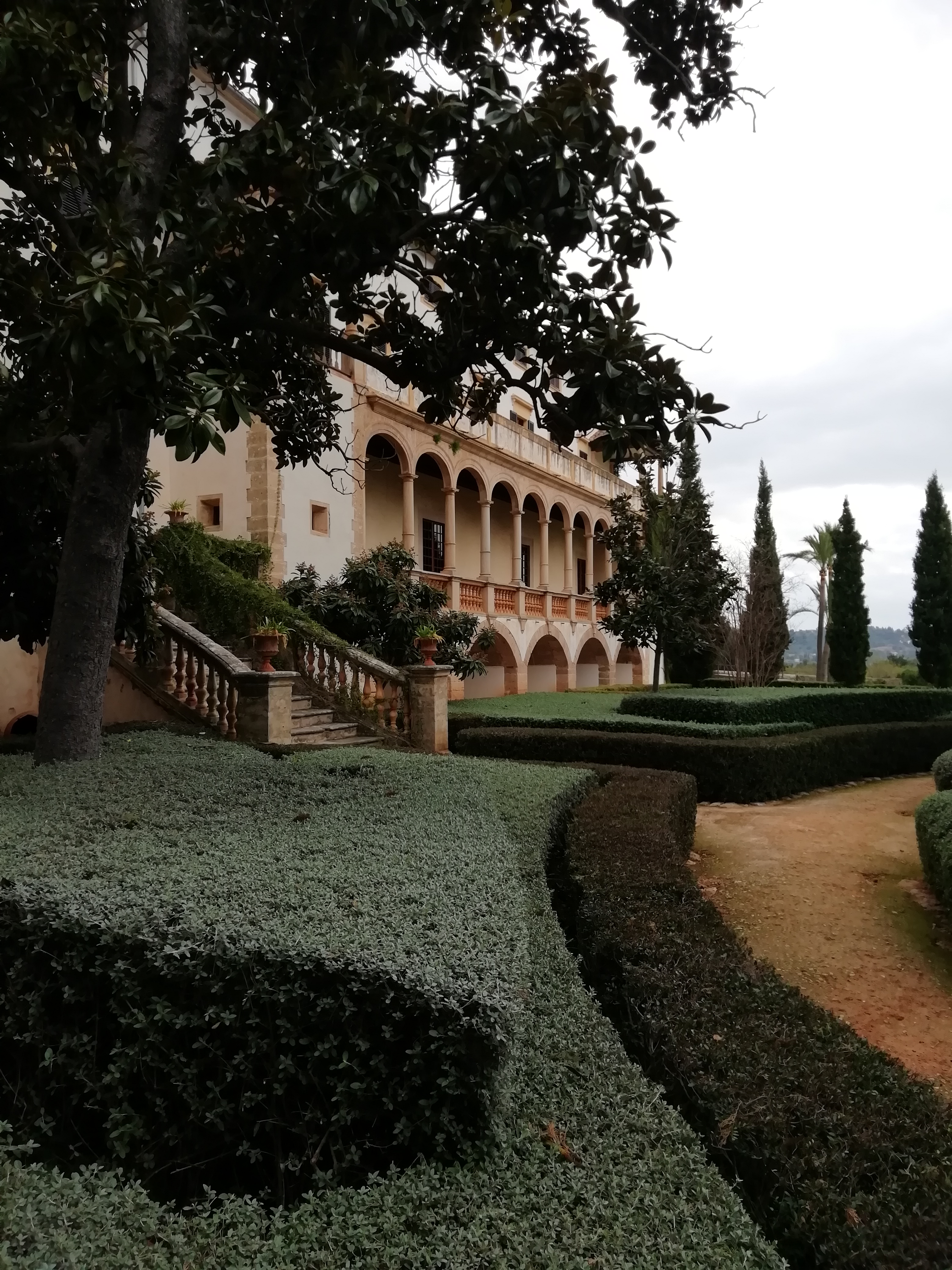 fachada lateral de la finca mallorquina Raixa, en Buñola.